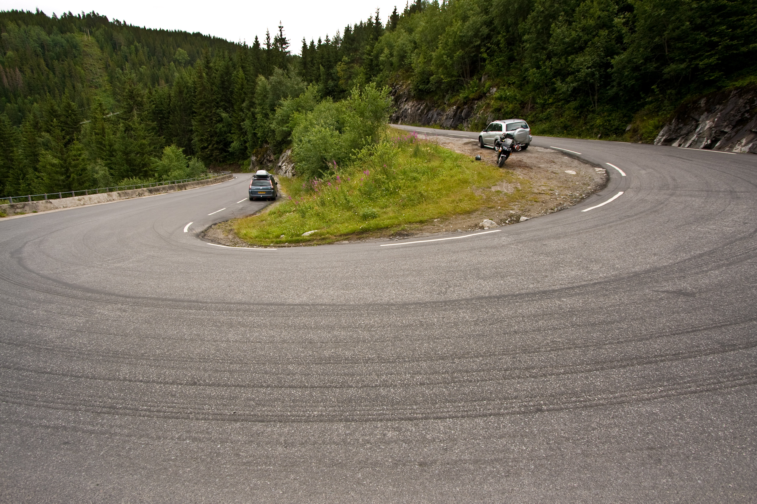 Riksveg 45 ved Dalen i Tokke